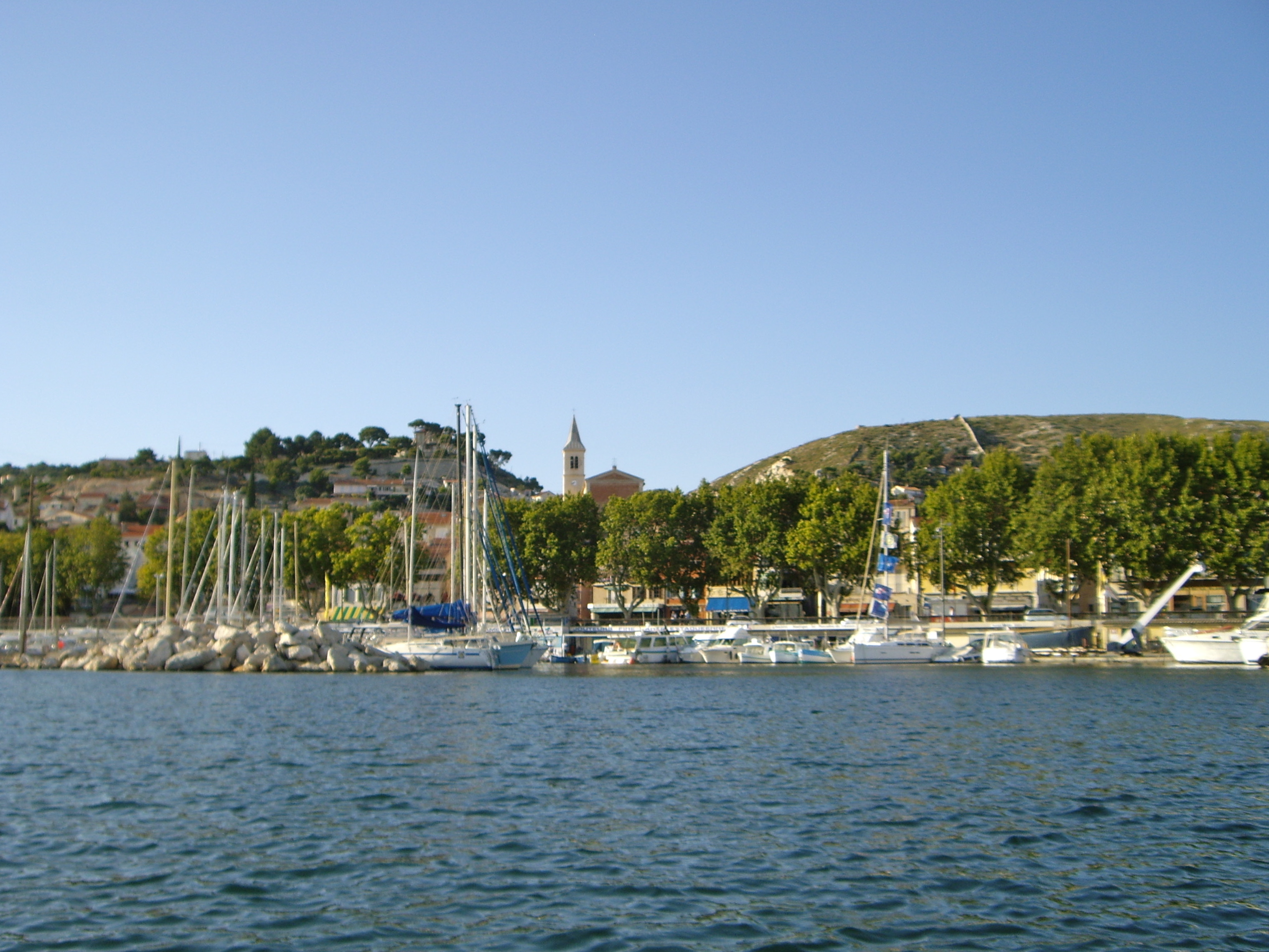 L'Estaque depuis l'entrée du port